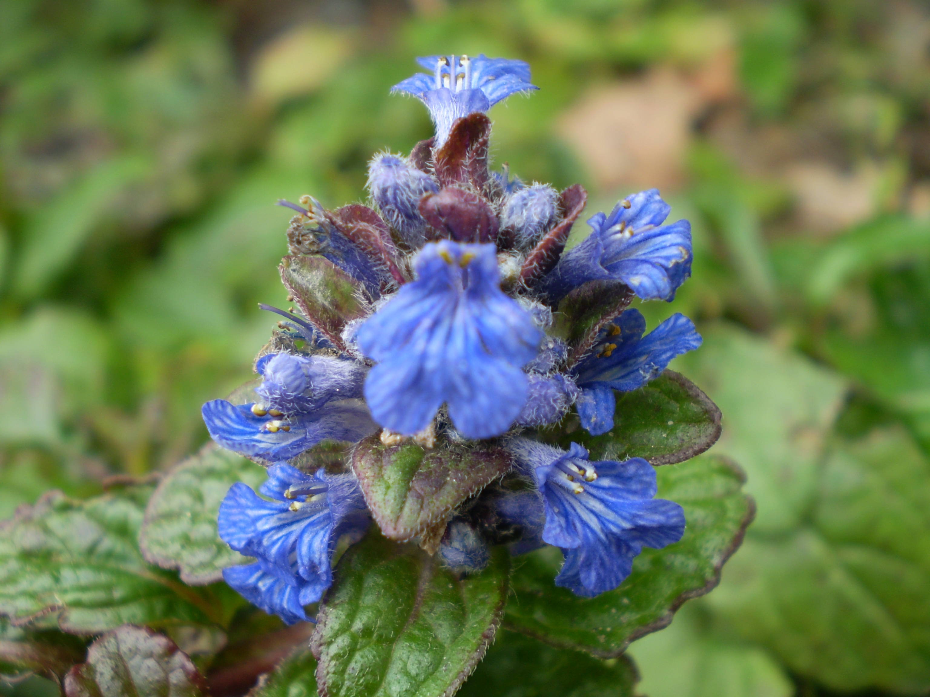 Ajuga reptans atropurpurea [rood zenegroen]